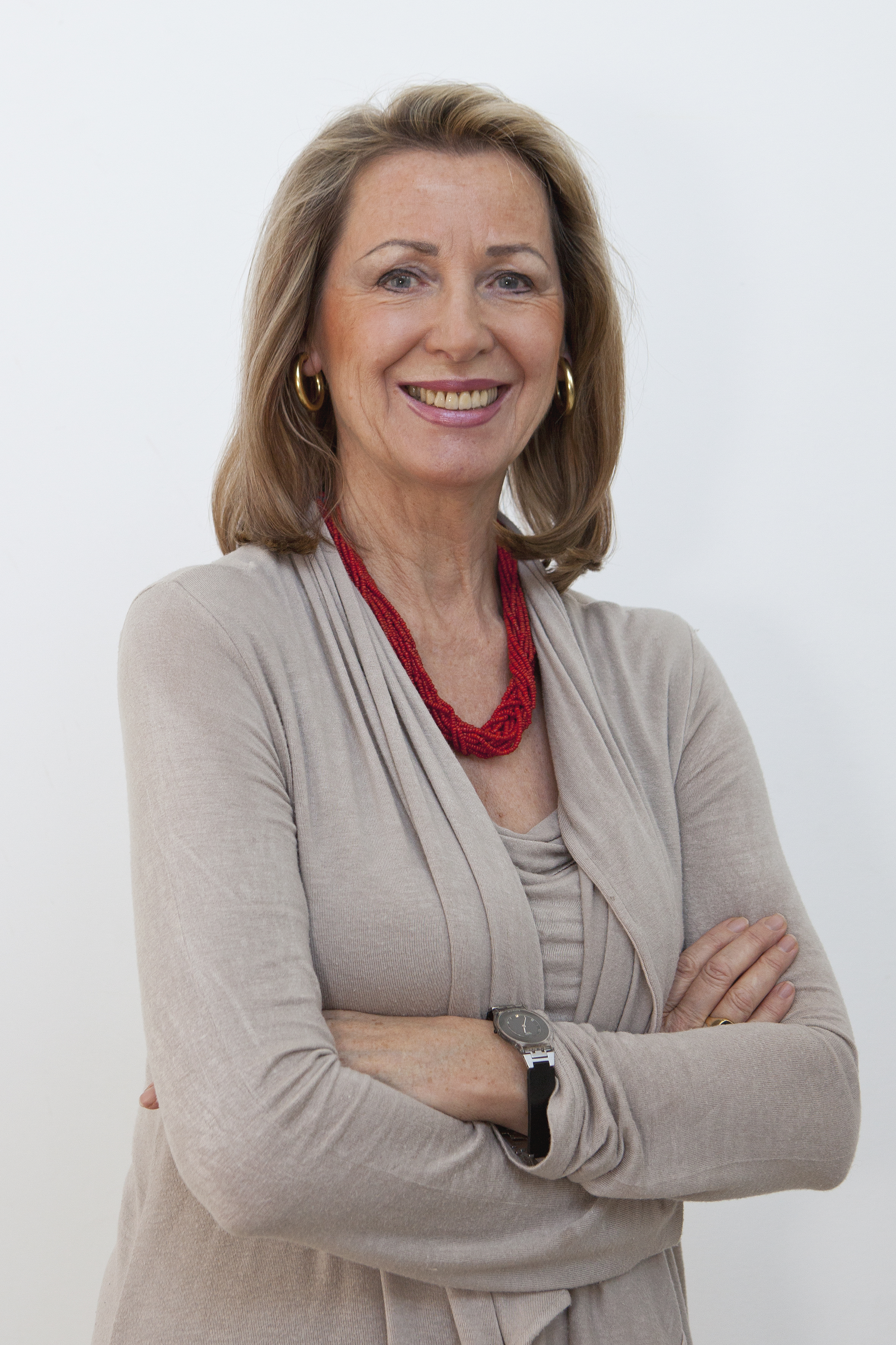 Monica Culen